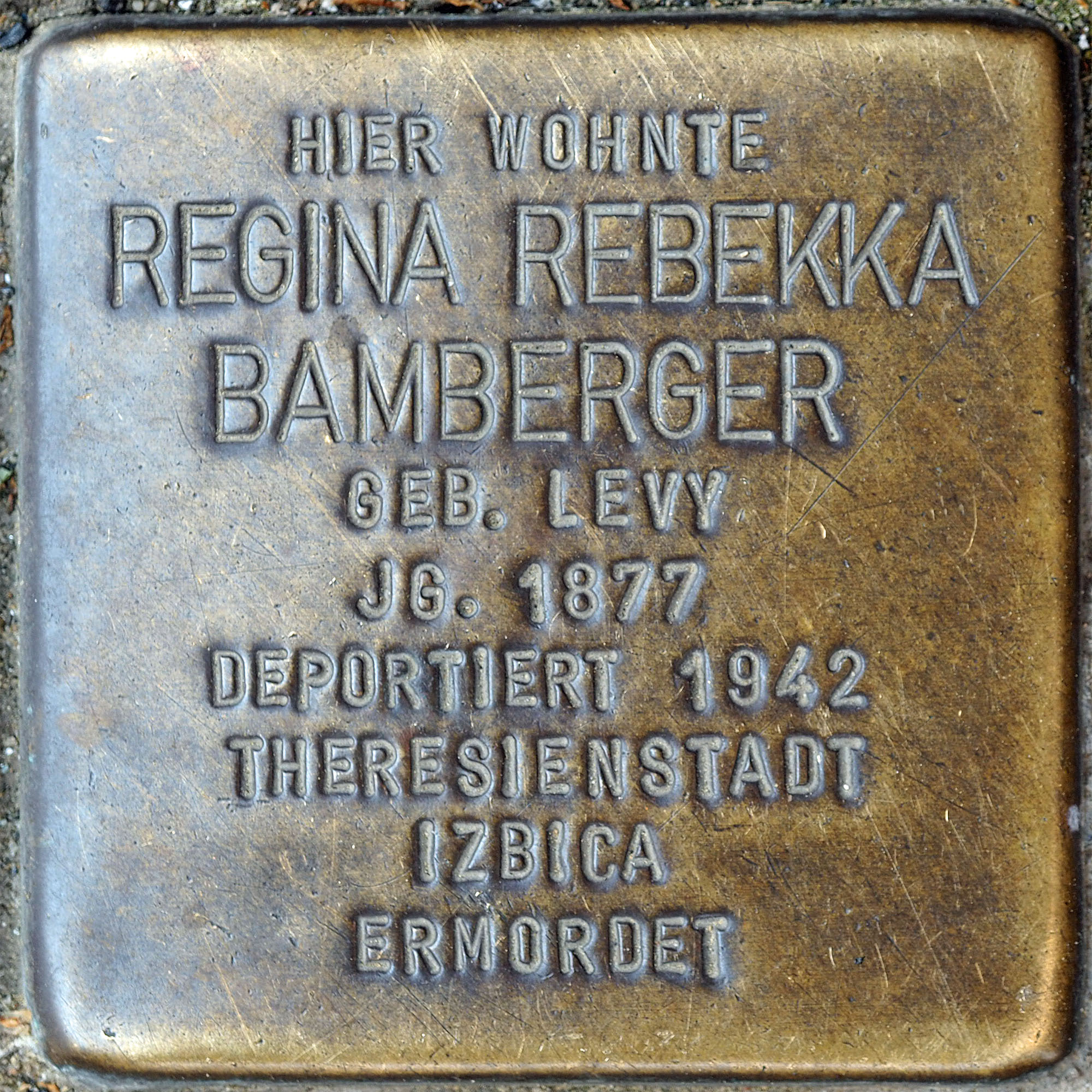 Stolpersteine MG: Bamberger, Regina Rebekka